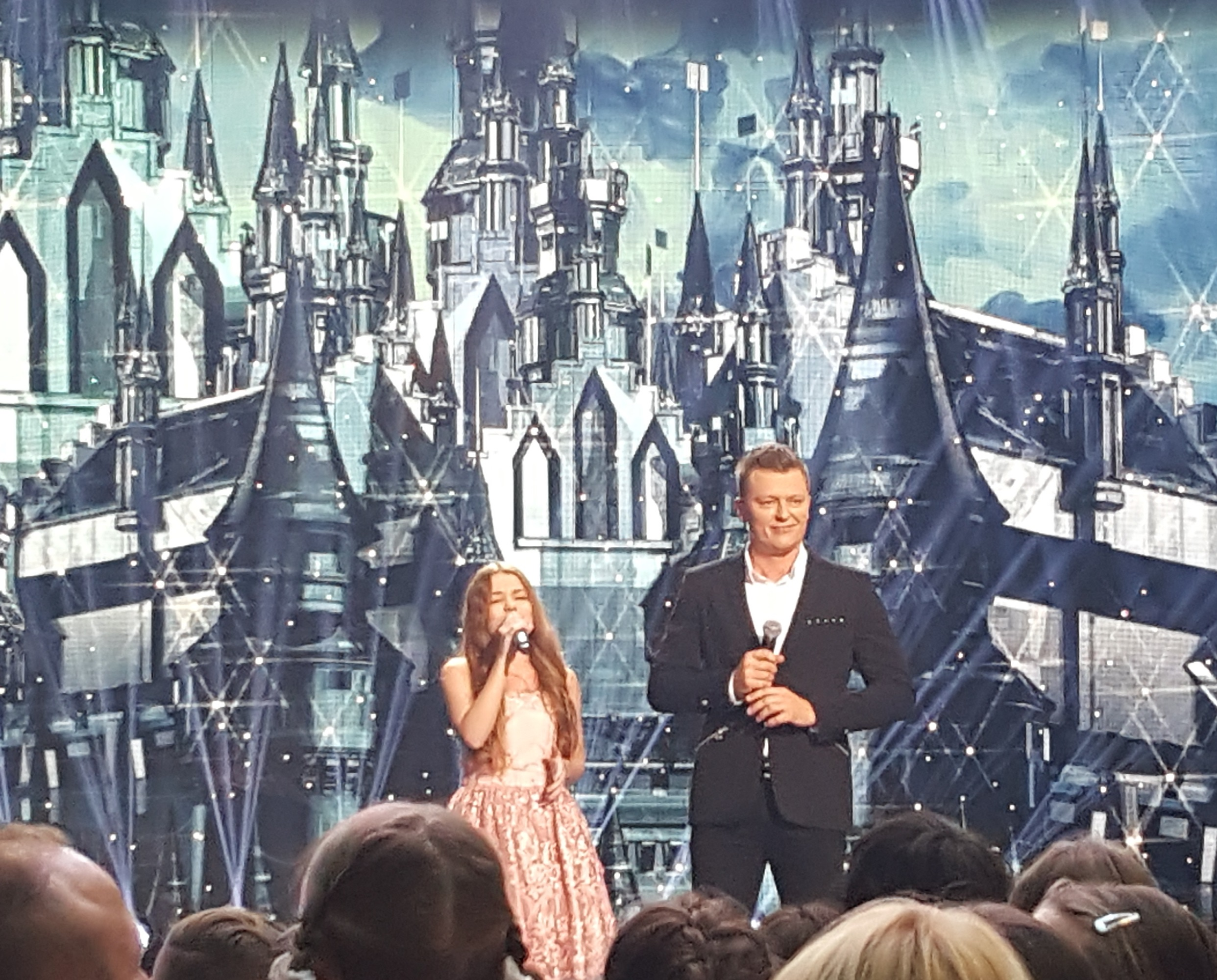 Polscy piosenkarze Olivia Wieczorek i Rafał Brzozowski w 2017 roku.